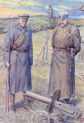 Картина "Алексеевцы".